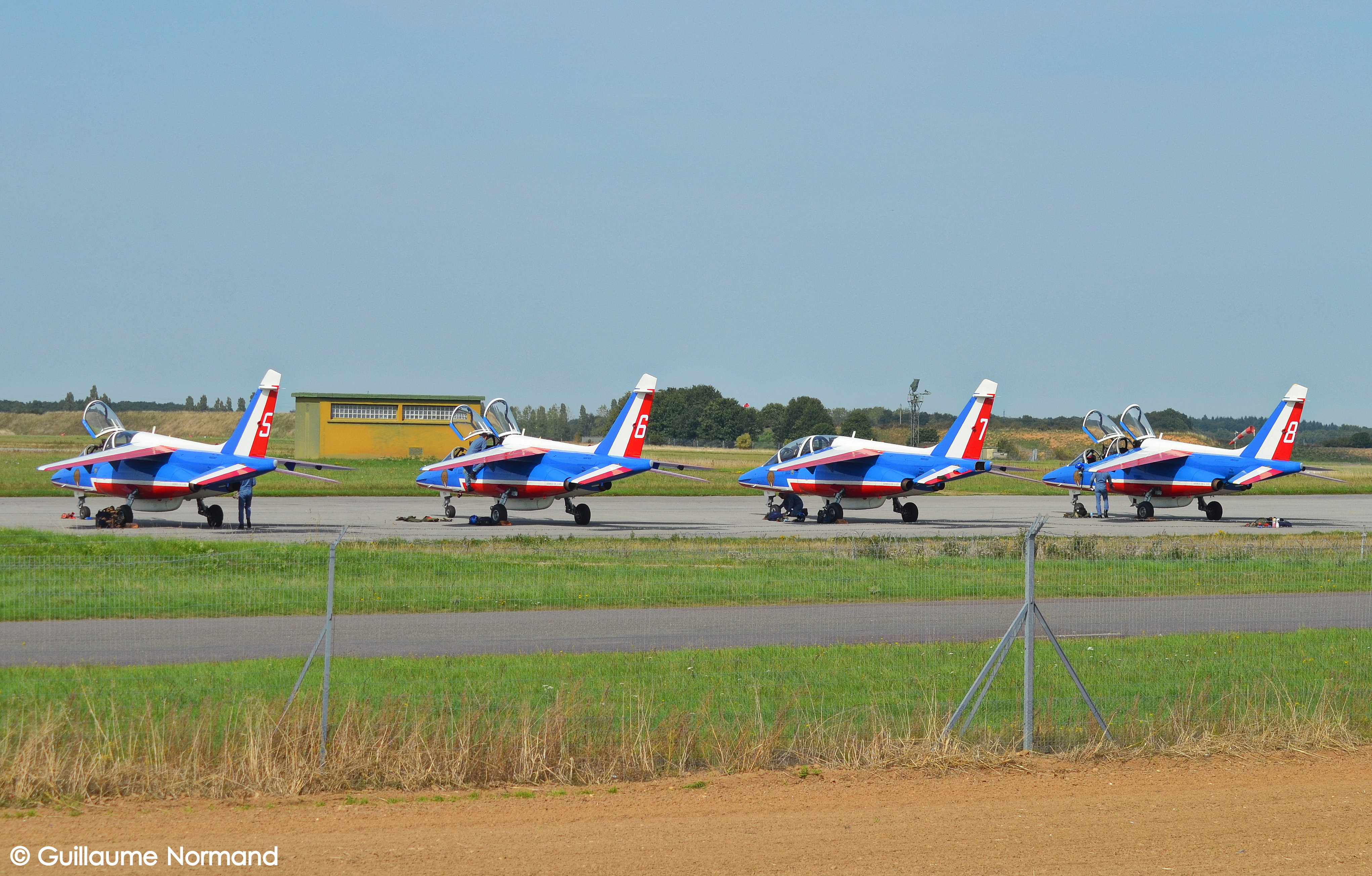 Dassault-Dornier Alphajet E French Air Force F-TERH F-TENA F-UGFE F-UHRT